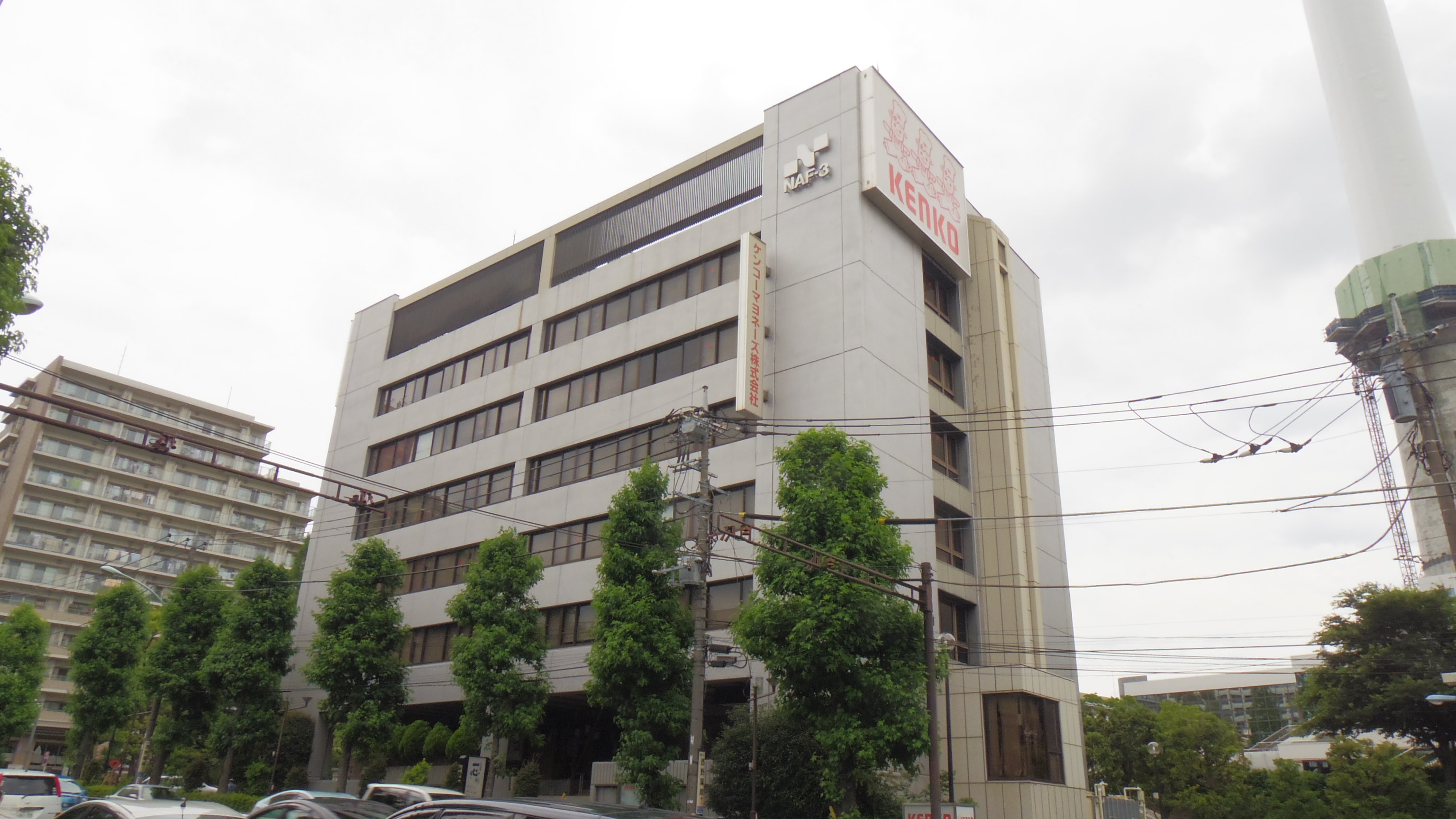 ケンコーマヨネーズ本社（東京都杉並区）